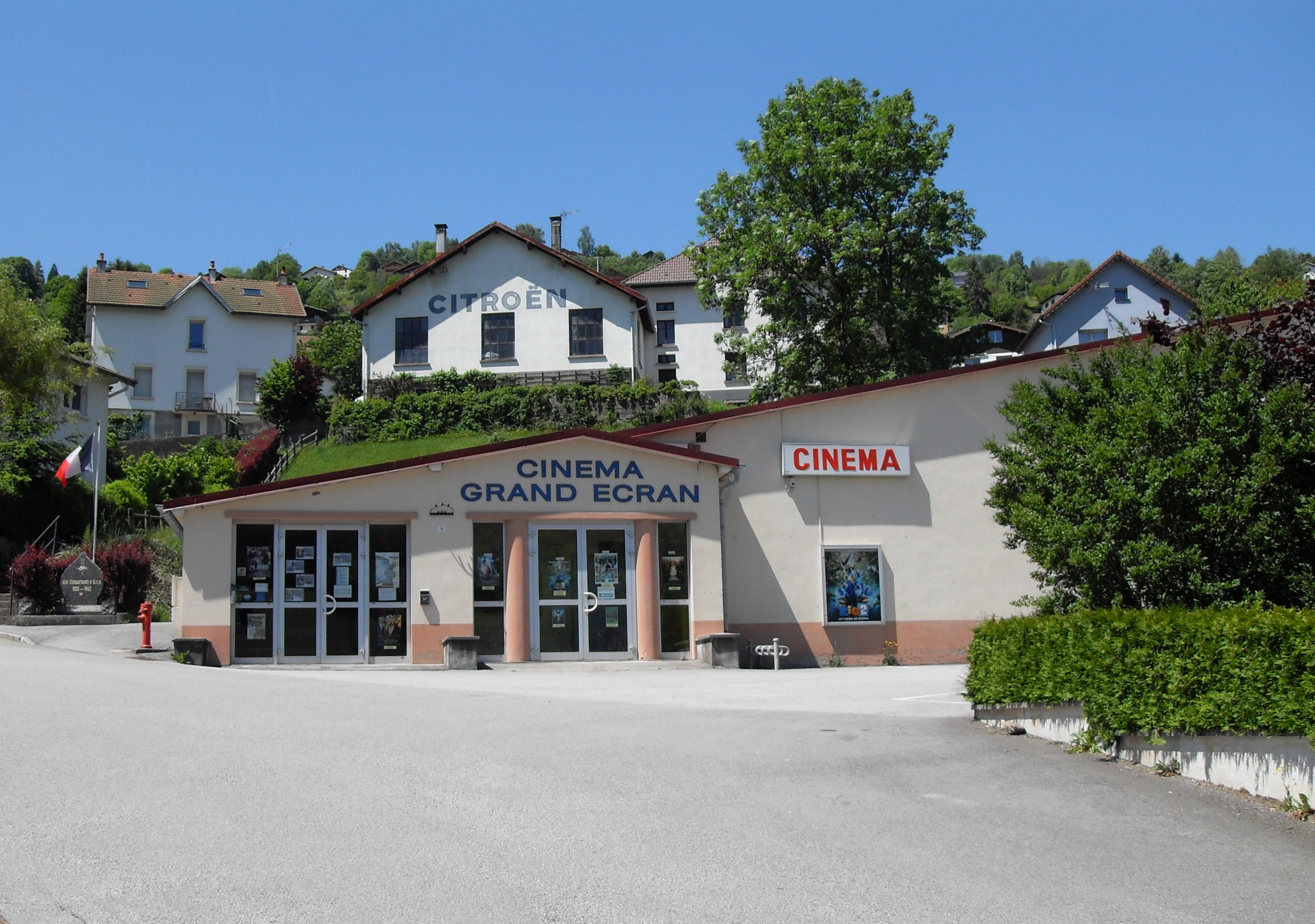 Le cinéma à La Bresse